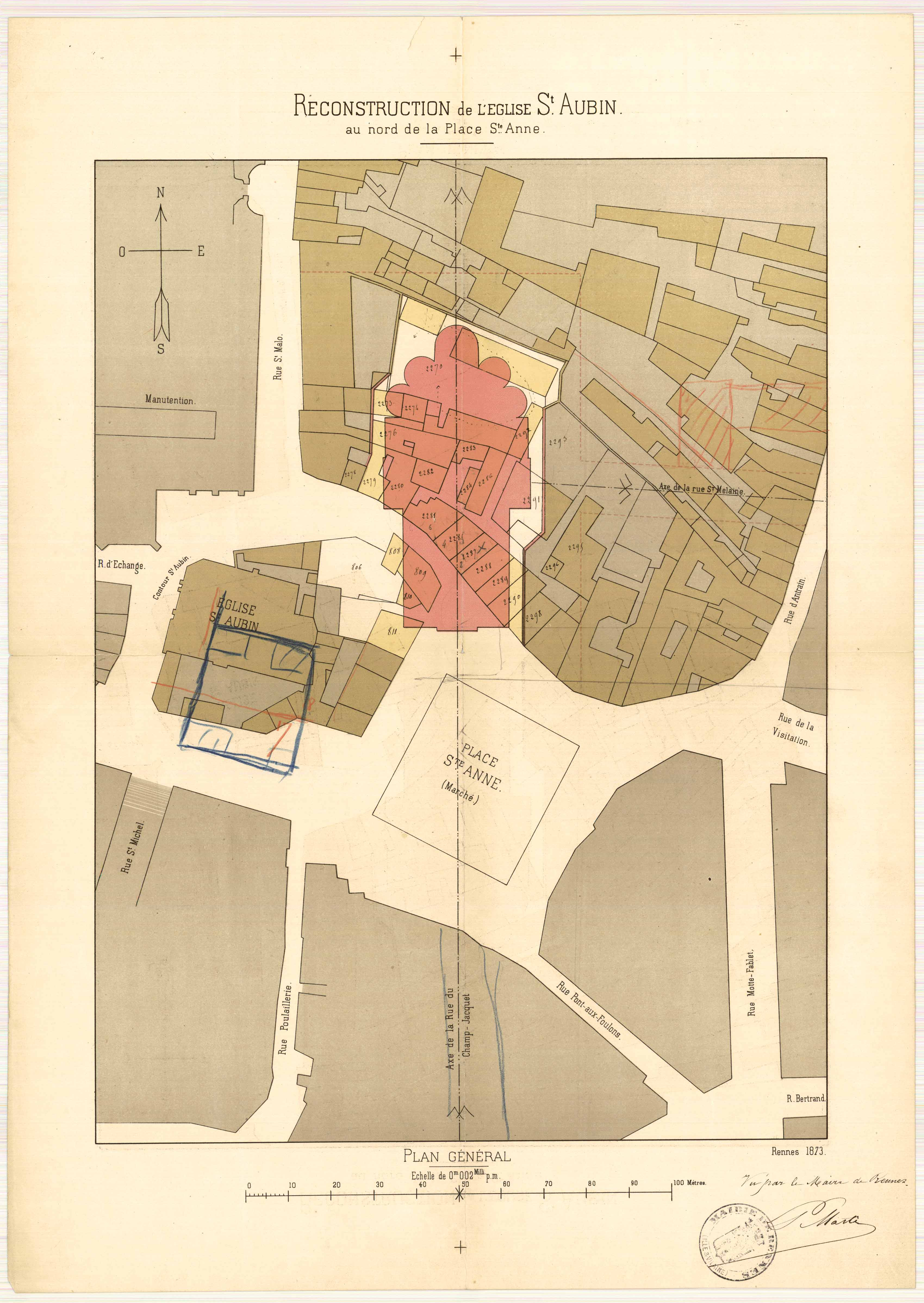 Projet d'implantation de l'église Saint-Aubin reconstruite au nord de la Place Sainte-Anne à Rennes. Archives municipales de Rennes, 2 Fi 1688.